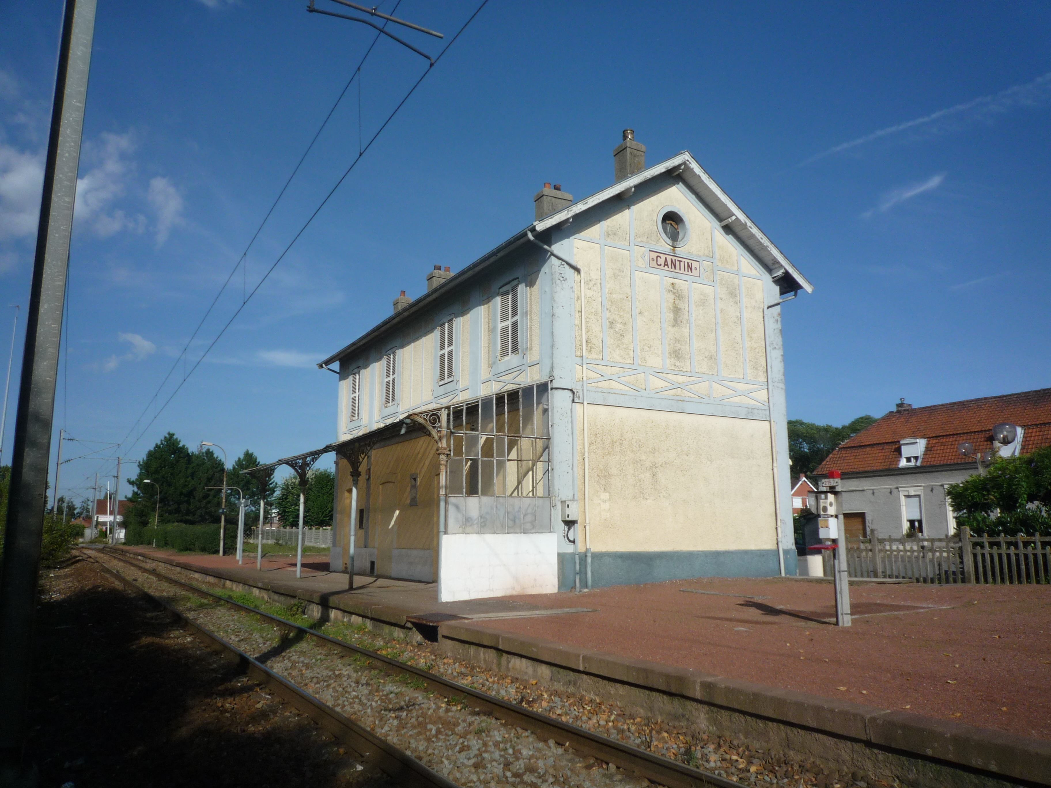 Bâtiments voyageurs de la Gare de Cantin, Nord, Nord-Pas-de-Calais, France.